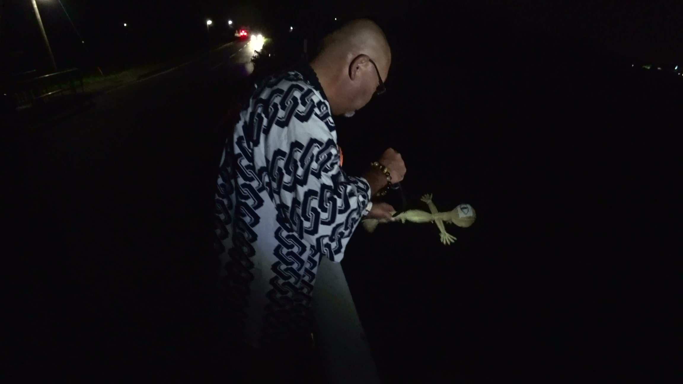 行事の最後に糸繰川に投げ入れられる藁人形